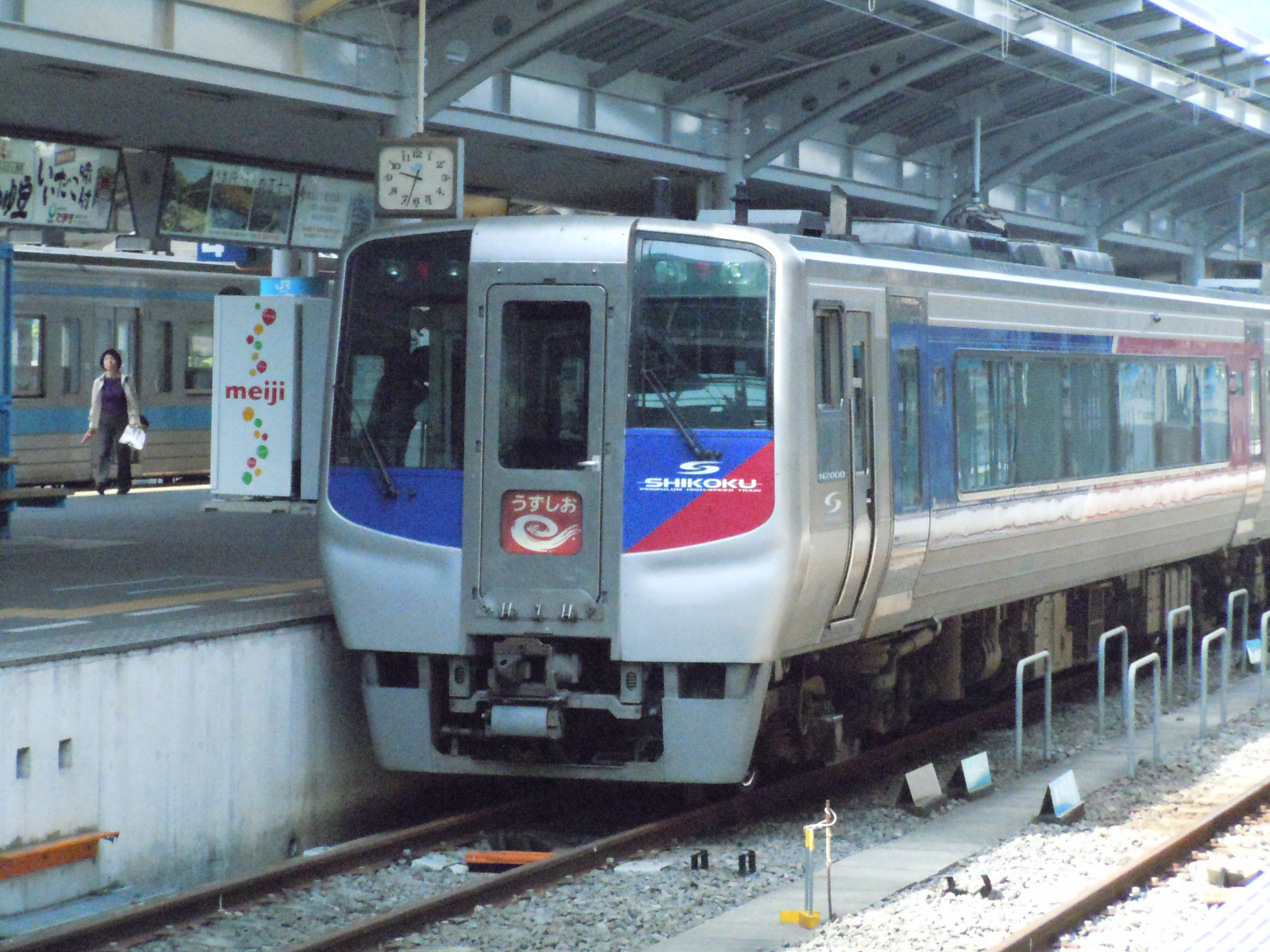 特急「うずしお」で運用中のN2000系。 高松にて